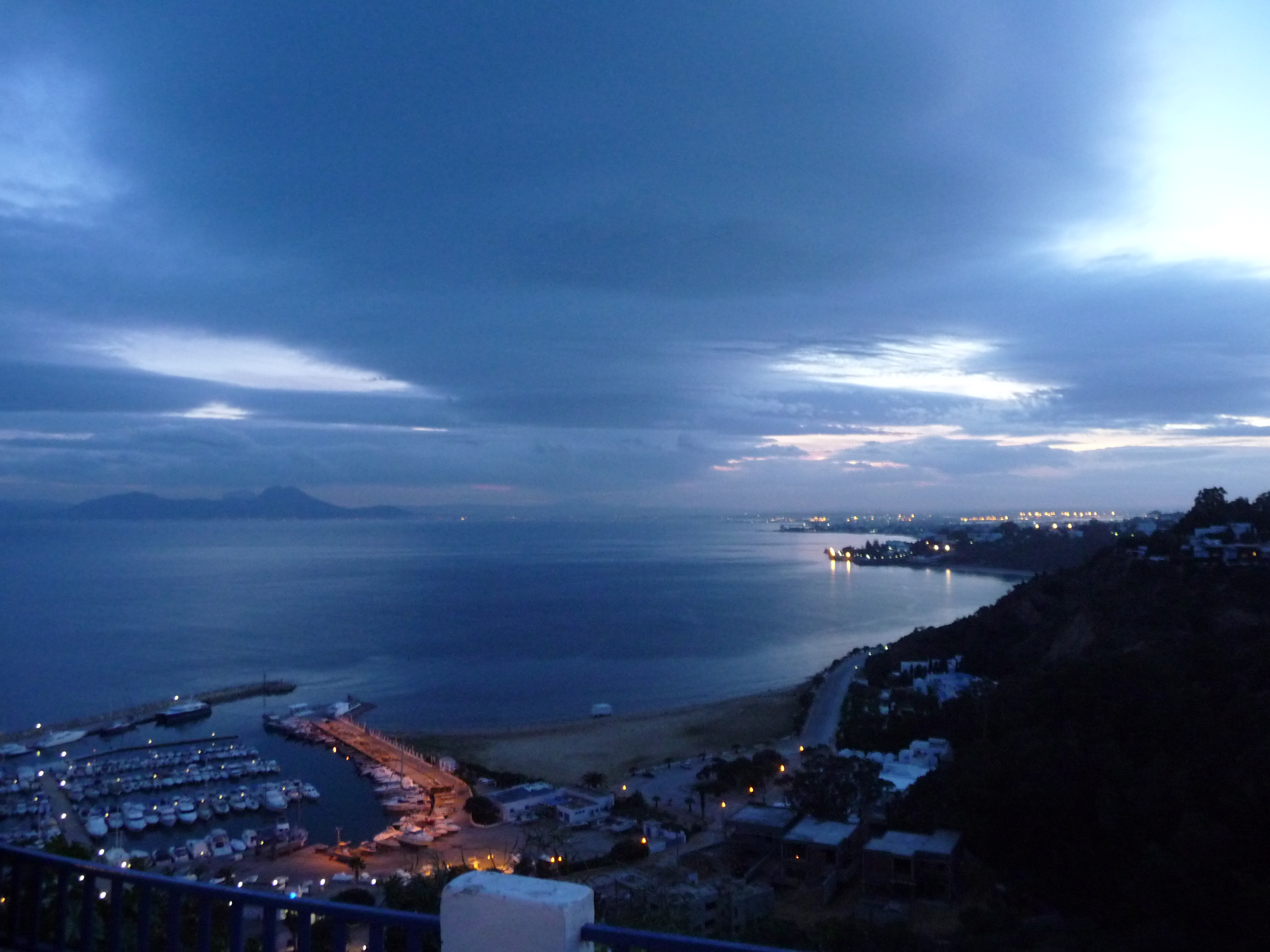 Golfe de Tunis et port de Sidi Bou Saïd, Tunisie.